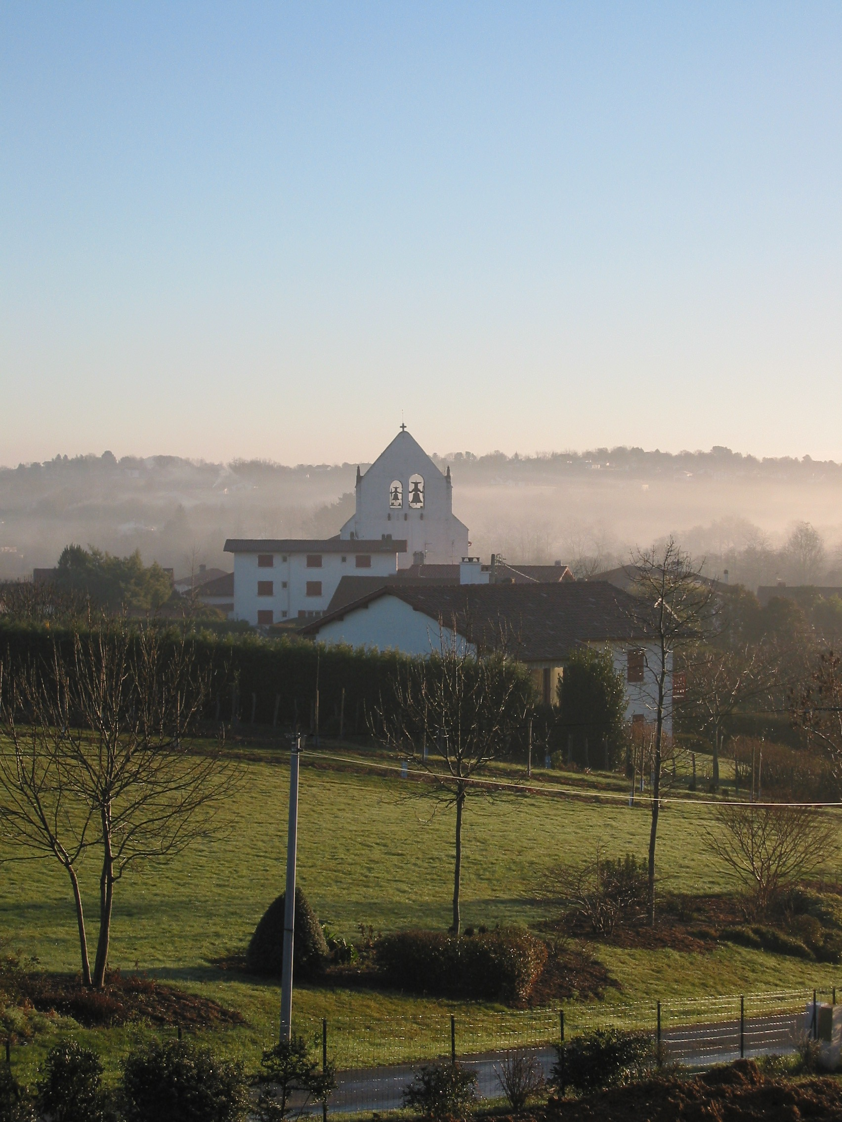 Vue de l'eglise d'Ahetze, prise le 01/01/05 par Harrieta171